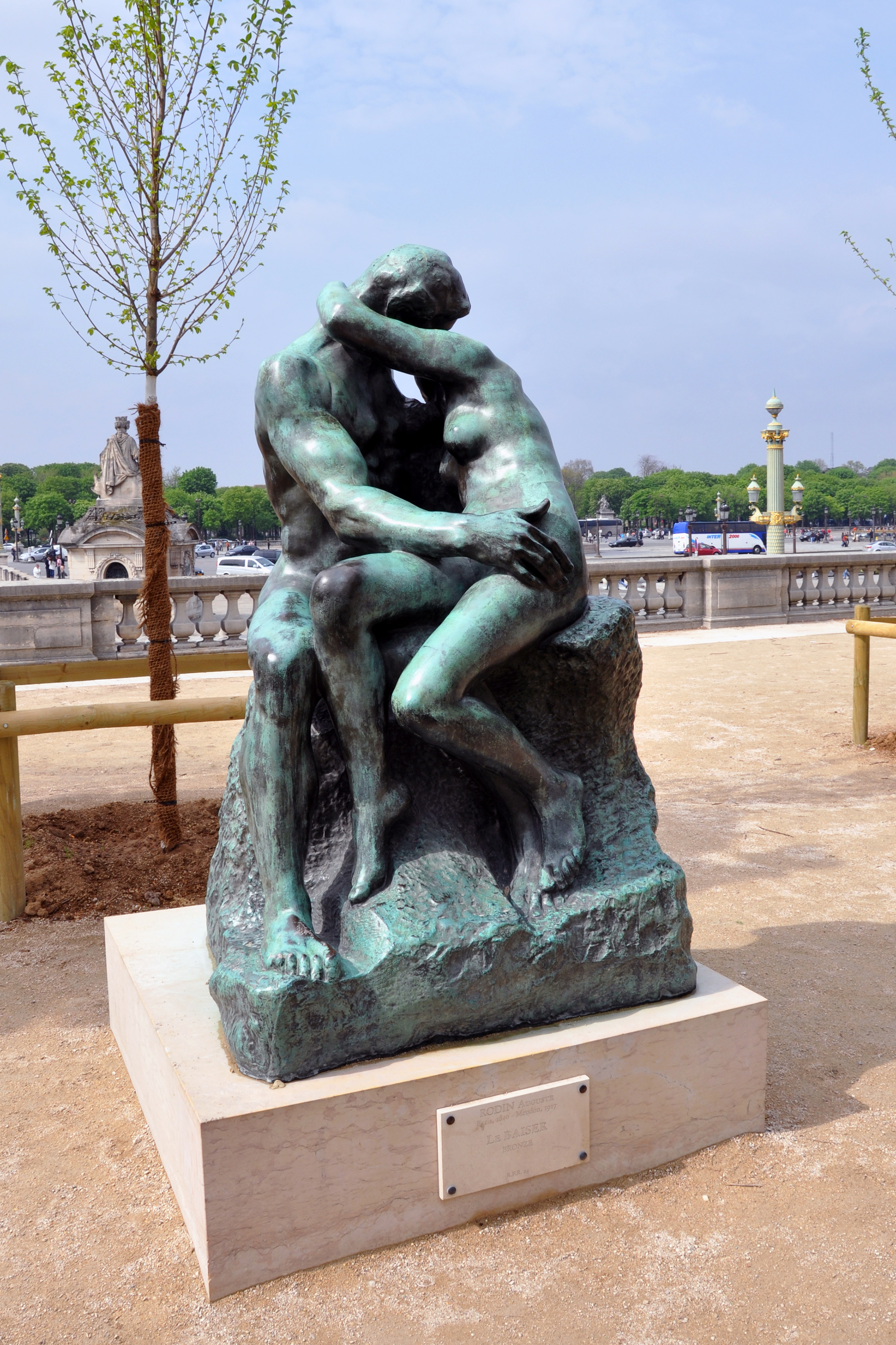 Le Baiser, par Auguste Rodin. Jardin des Tuileries.